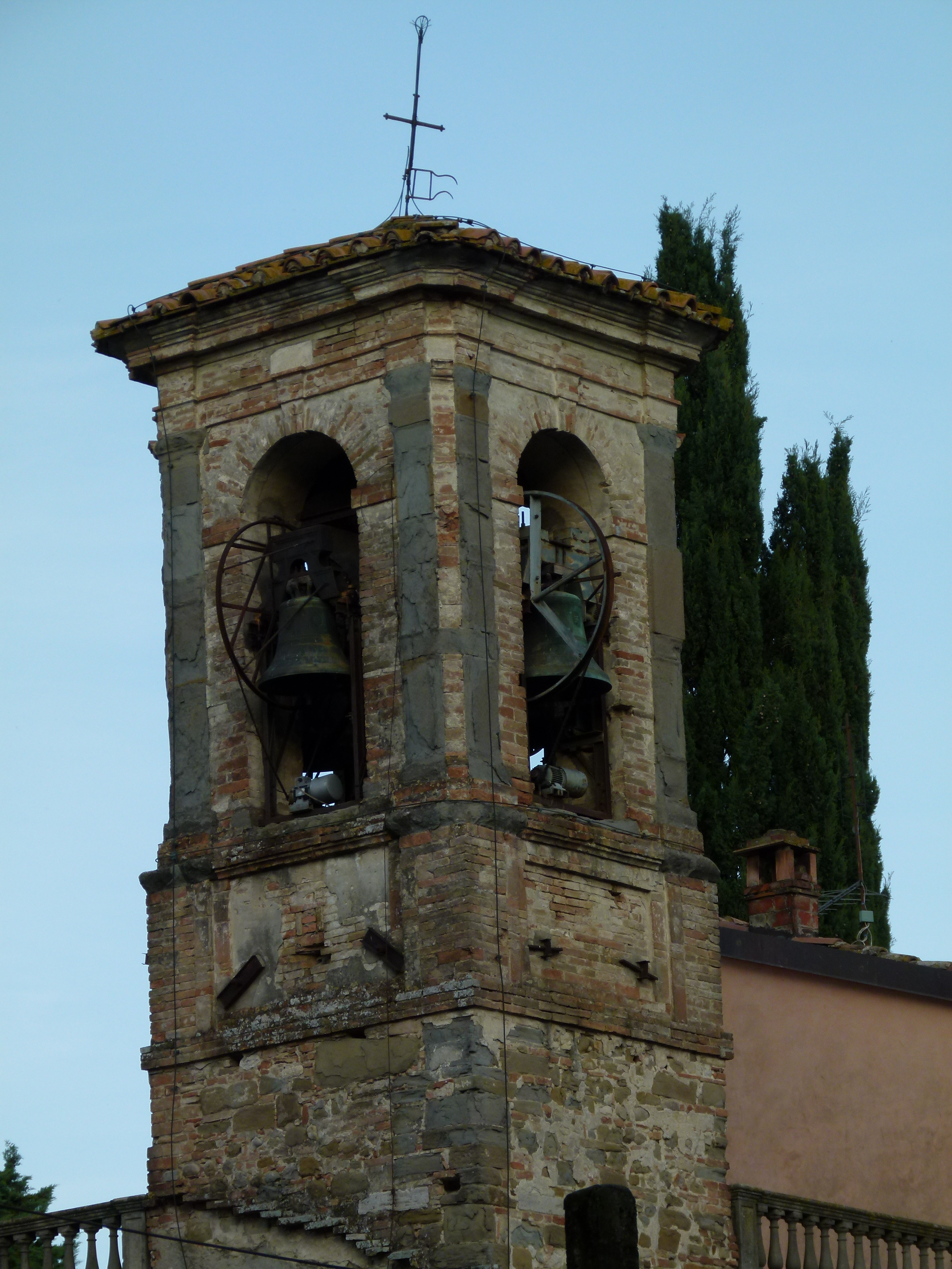 This photo was taken with Panasonic Lumix DMC-FZ100 camera, thanks to Panasonic. You can see all photographs in category: Taken with Panasonic Lumix DMC-FZ100.